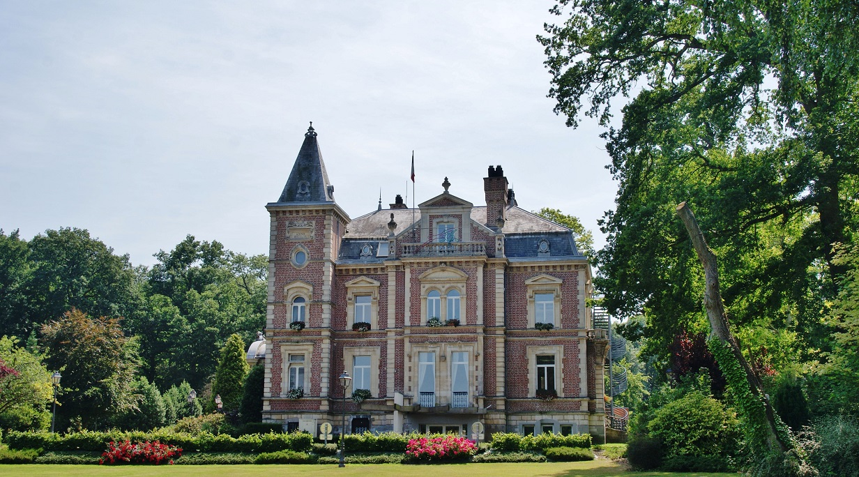 La Mairie